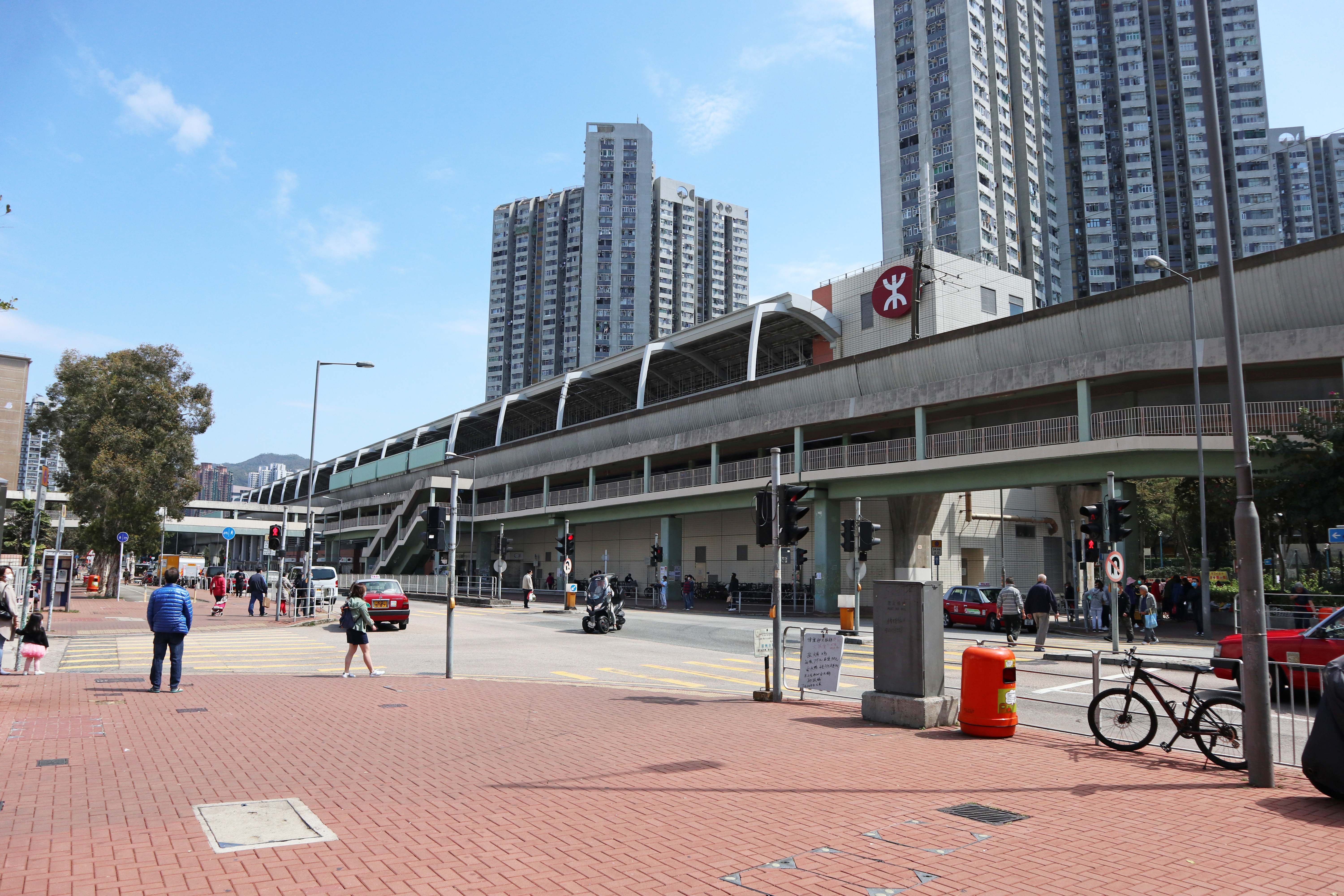 港鐵沙田圍站外觀